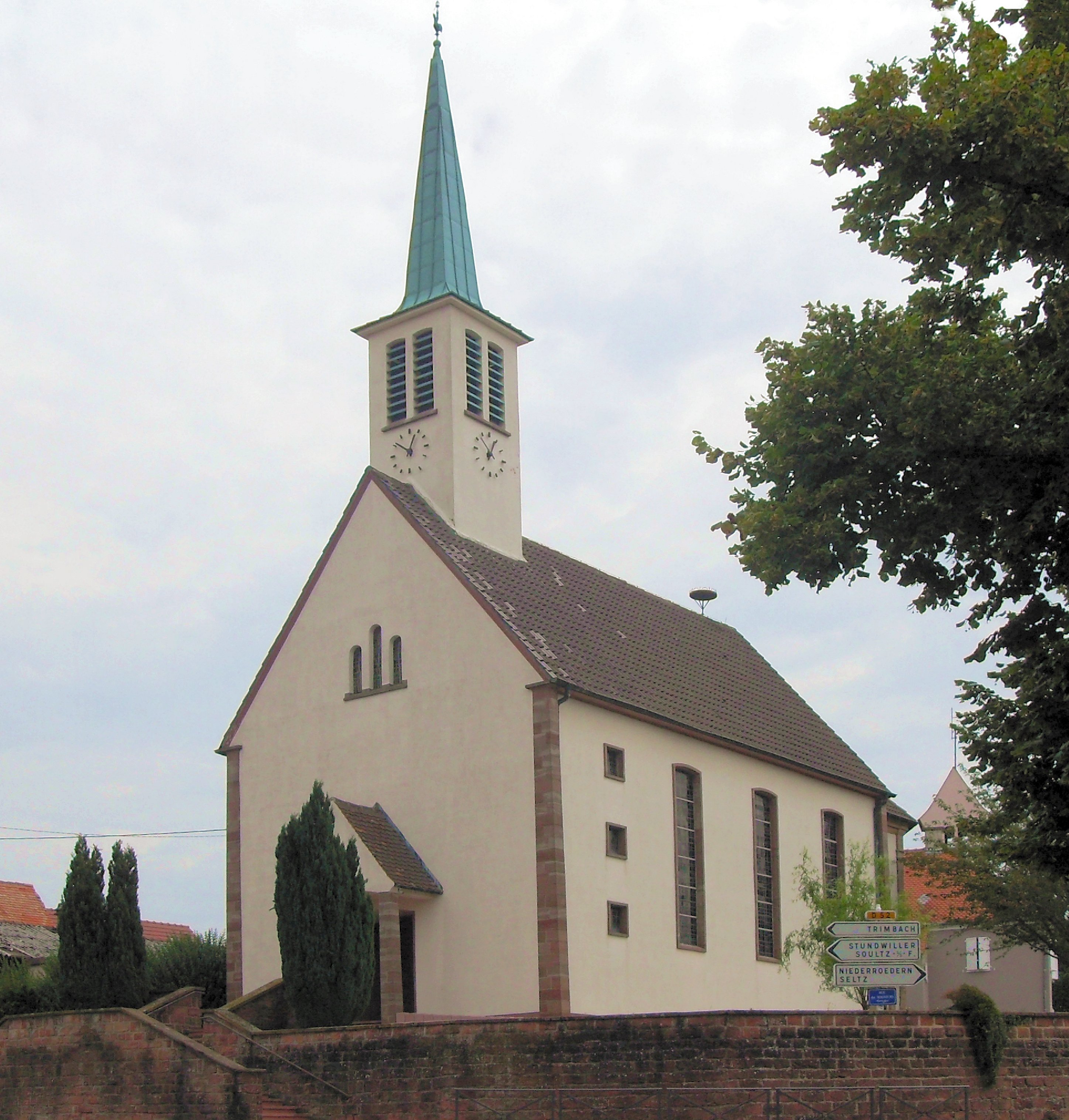 Le temple protestant à Buhl